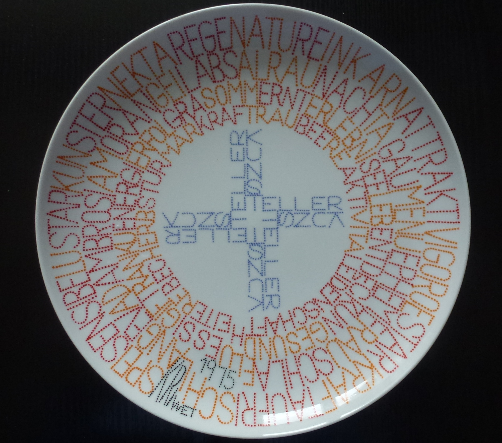 Künstlerteller von Ferdinand Kriwet